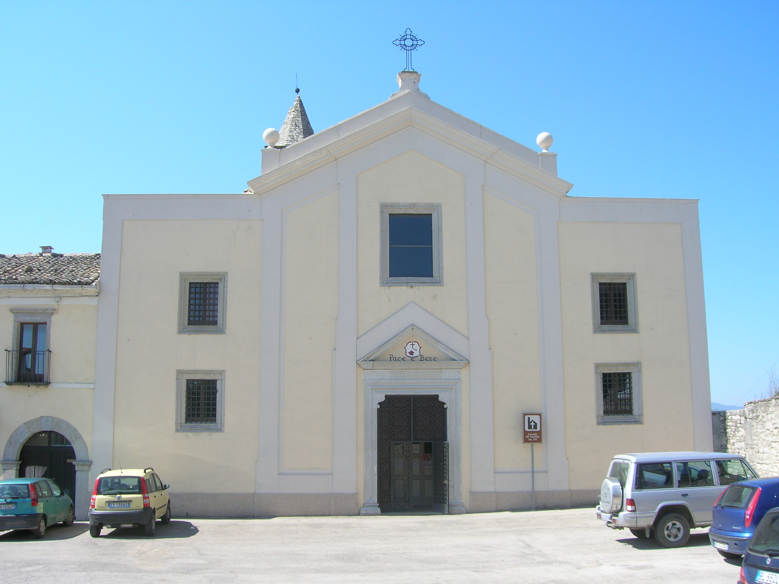 Convento SS Corcofisso, Forenza (PZ)